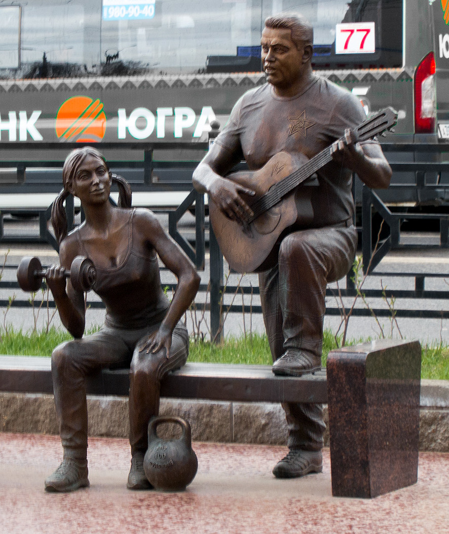 Люберцы.Расторгуев.